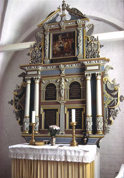 Ørslev Kirke (Slagelse Kommune) i Danmark. Altertavle